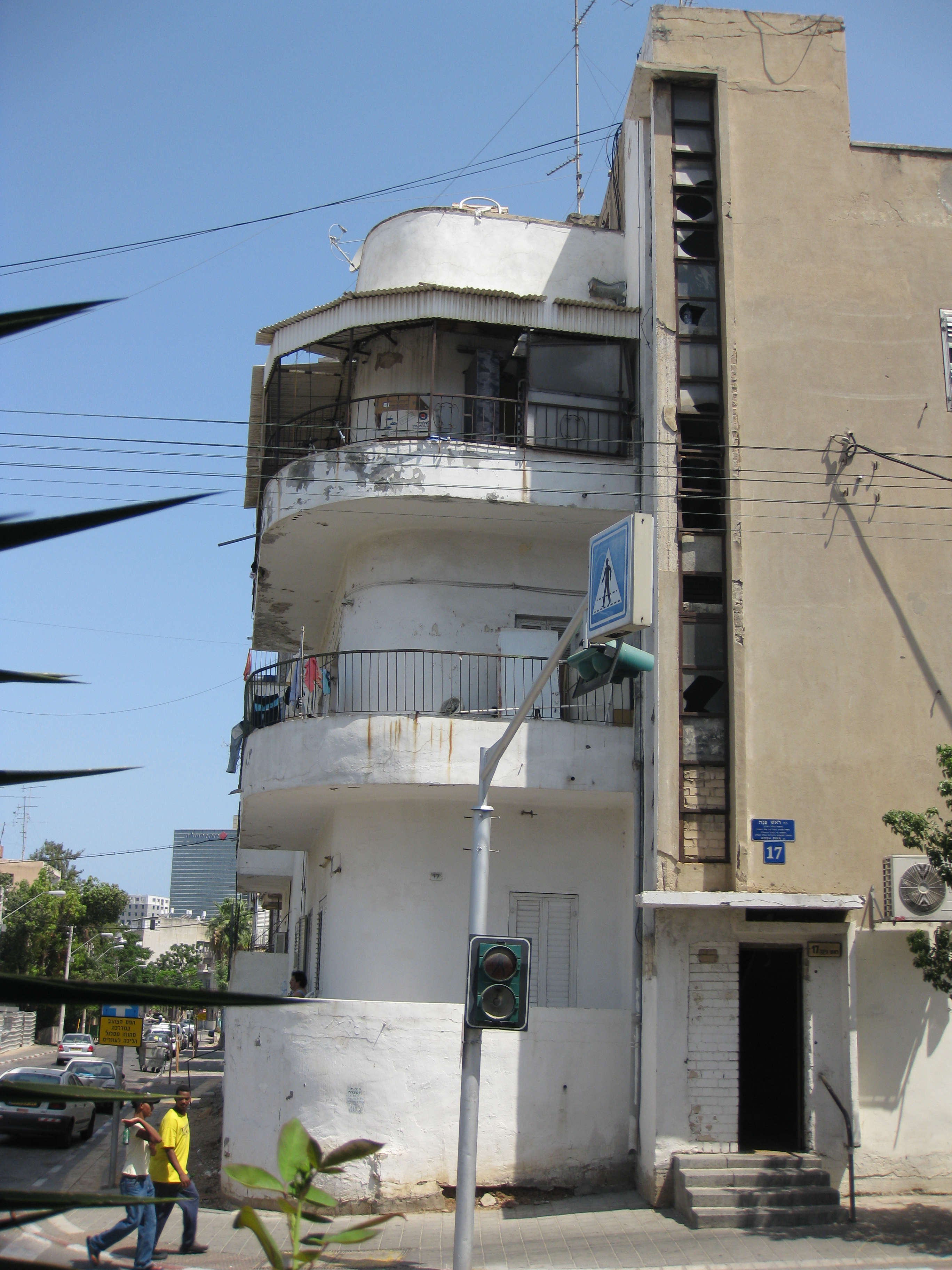 International Style buildings in Neve Shaanan מבנים בסגנון בינלאומי בשכונת נווה שאנן בית ילדותו של חנוך לווין The childhood home of Hanoch Levin